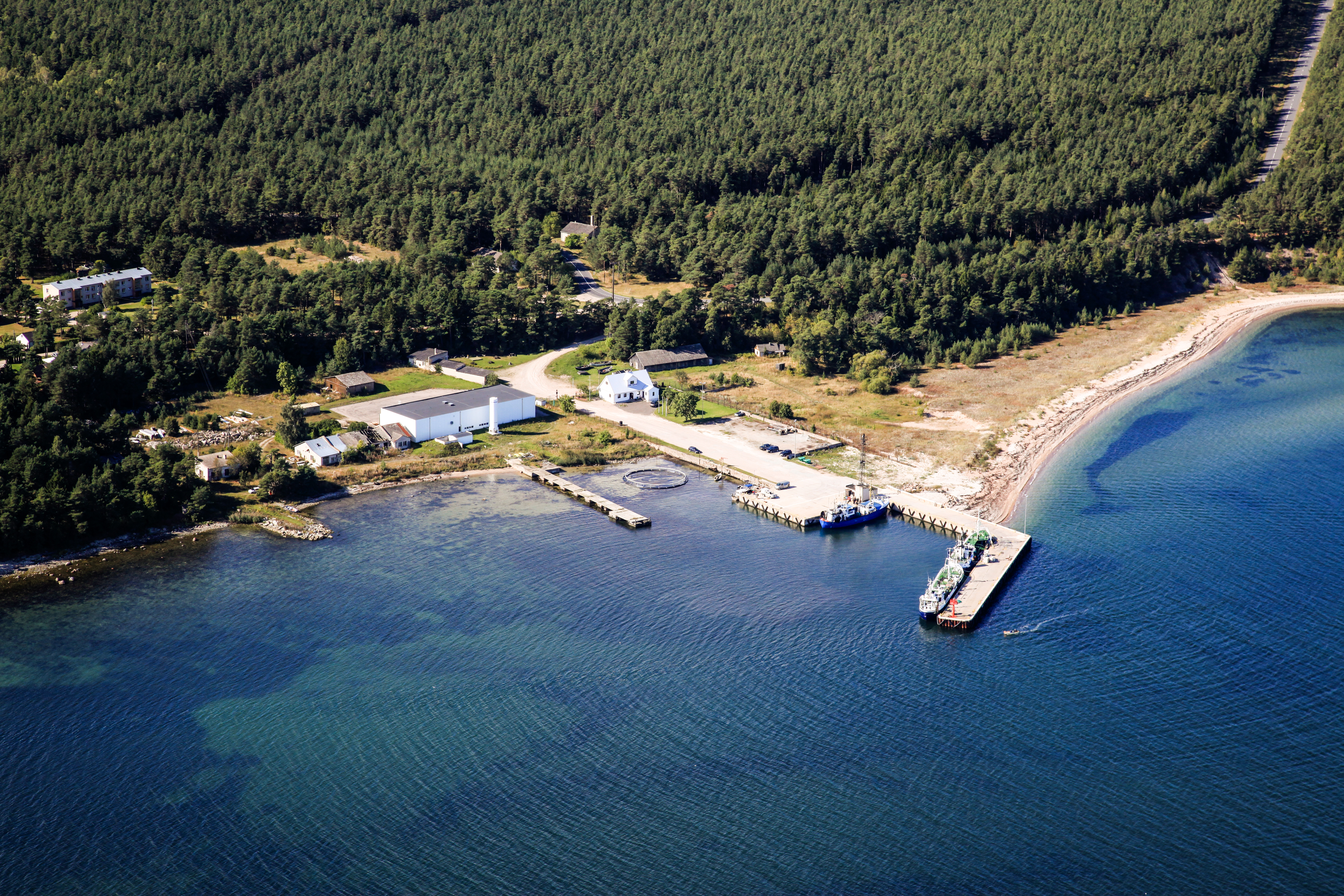 Veere sadam